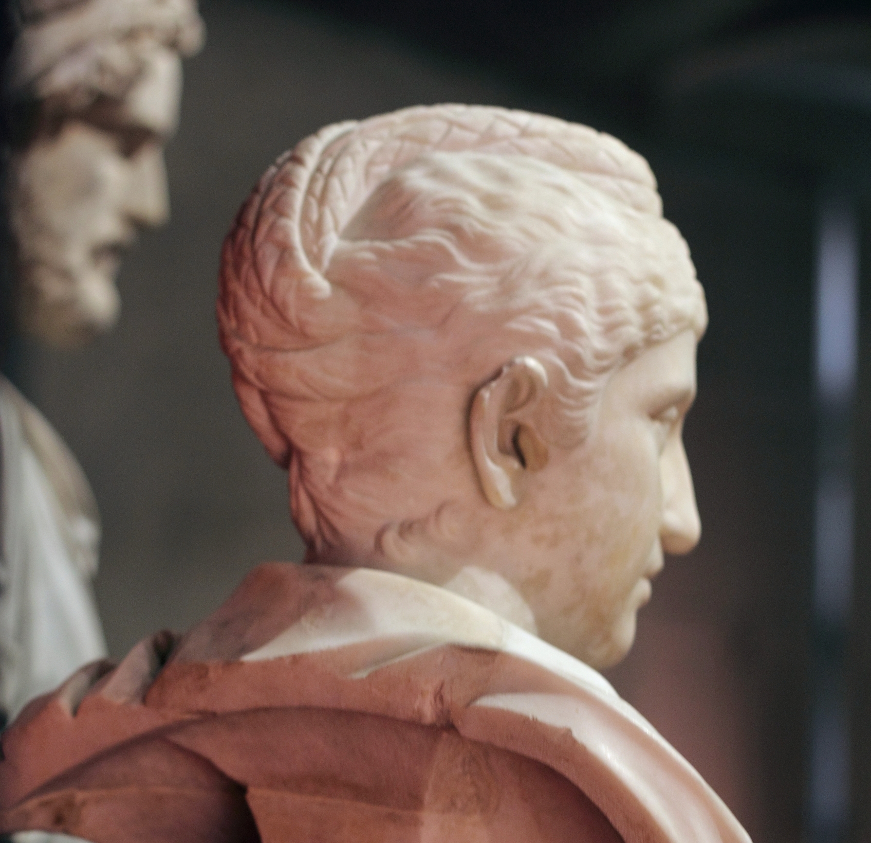 Buste de Faustine l'ancienne. Noter la coiffure distinctive. Photograph taken at: L'Image et le Pouvoir : le siècle des Antonins, Musée Saint-Raymond, 19 November 2011–18 March 2012 .